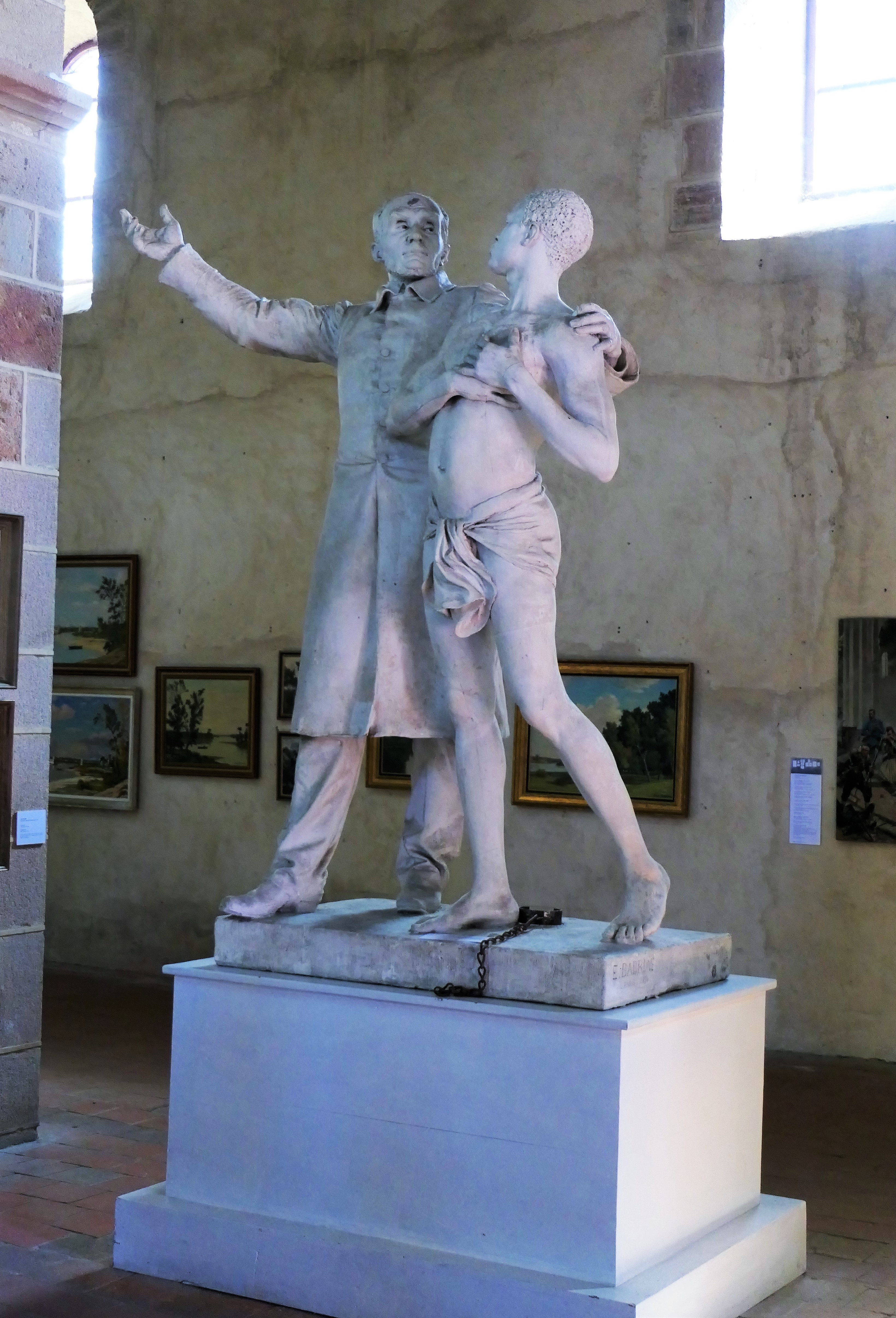 Libération des noirs (1896) Louis-Ernest Barrias, Musée Saint-Nazaire, Bourbon-Lancy